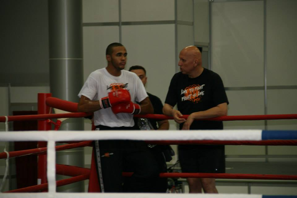 Красимир Гергинов, Дюк Нуамеруе, ABC Fight Club